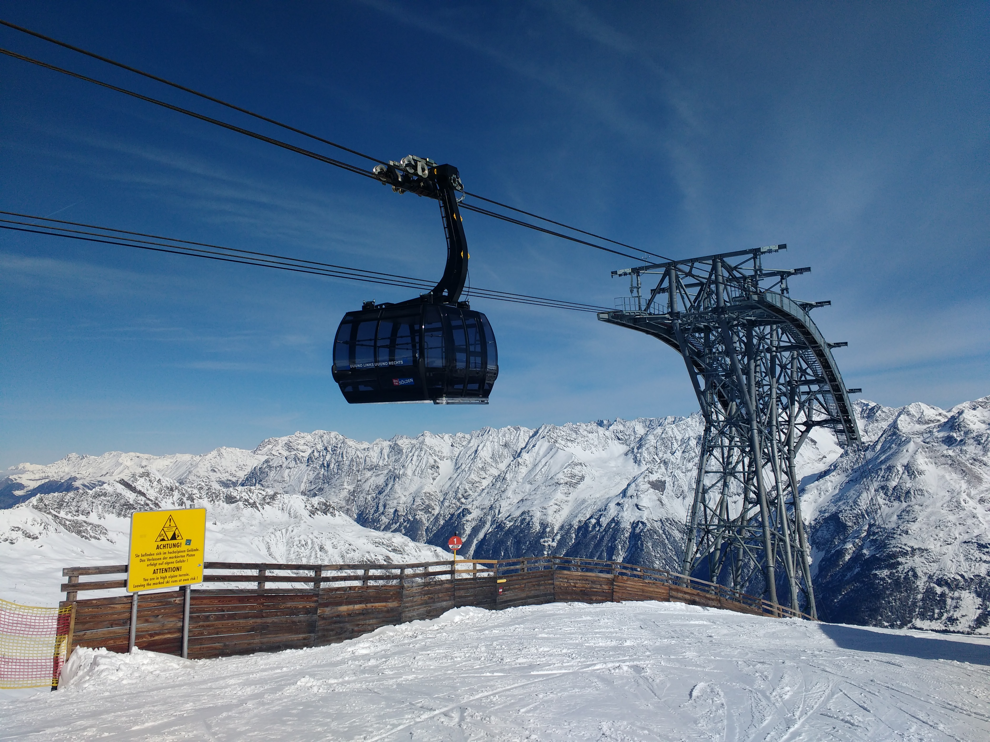 Gondel fährt aus Gaislachkogl-Ⅱ-Bergstation aus